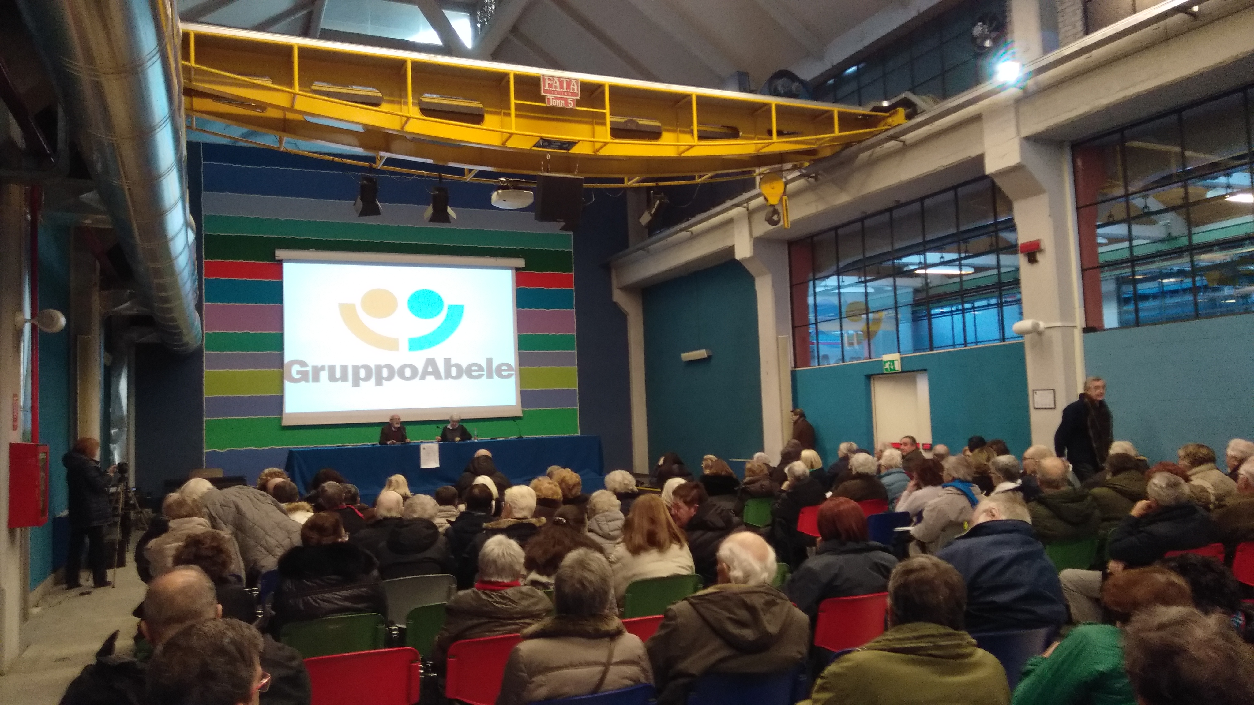 Incontro per il decennale della morte di don Carlo De Michelis, prete operaio e sindacalista